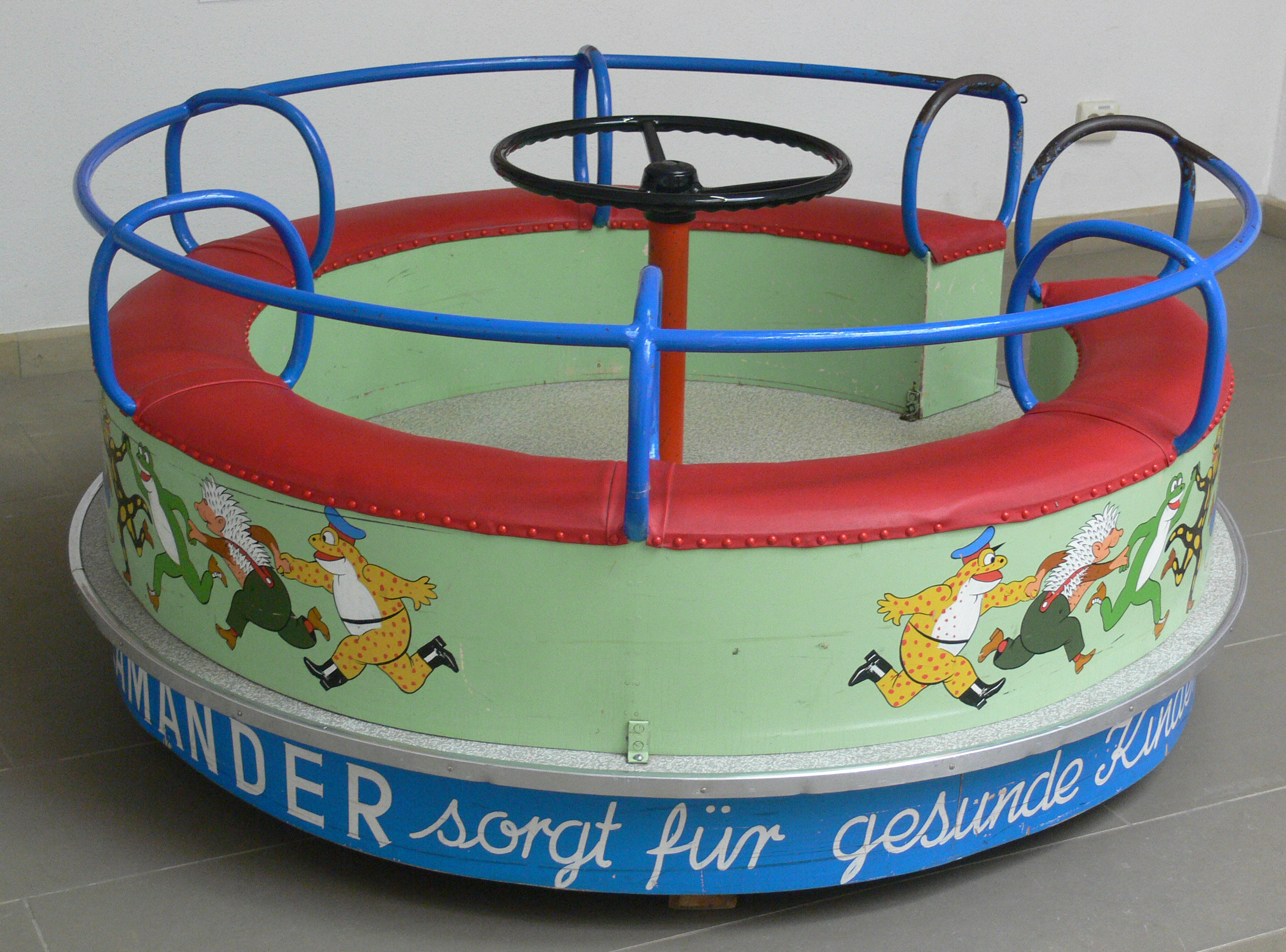 Lurchi-Karussell, Werbung für die Fa. Salamander, ca. 1970 Landesmuseum Württemberg (Außenstelle Museum für Volkskultur in Württemberg, Waldenbuch)